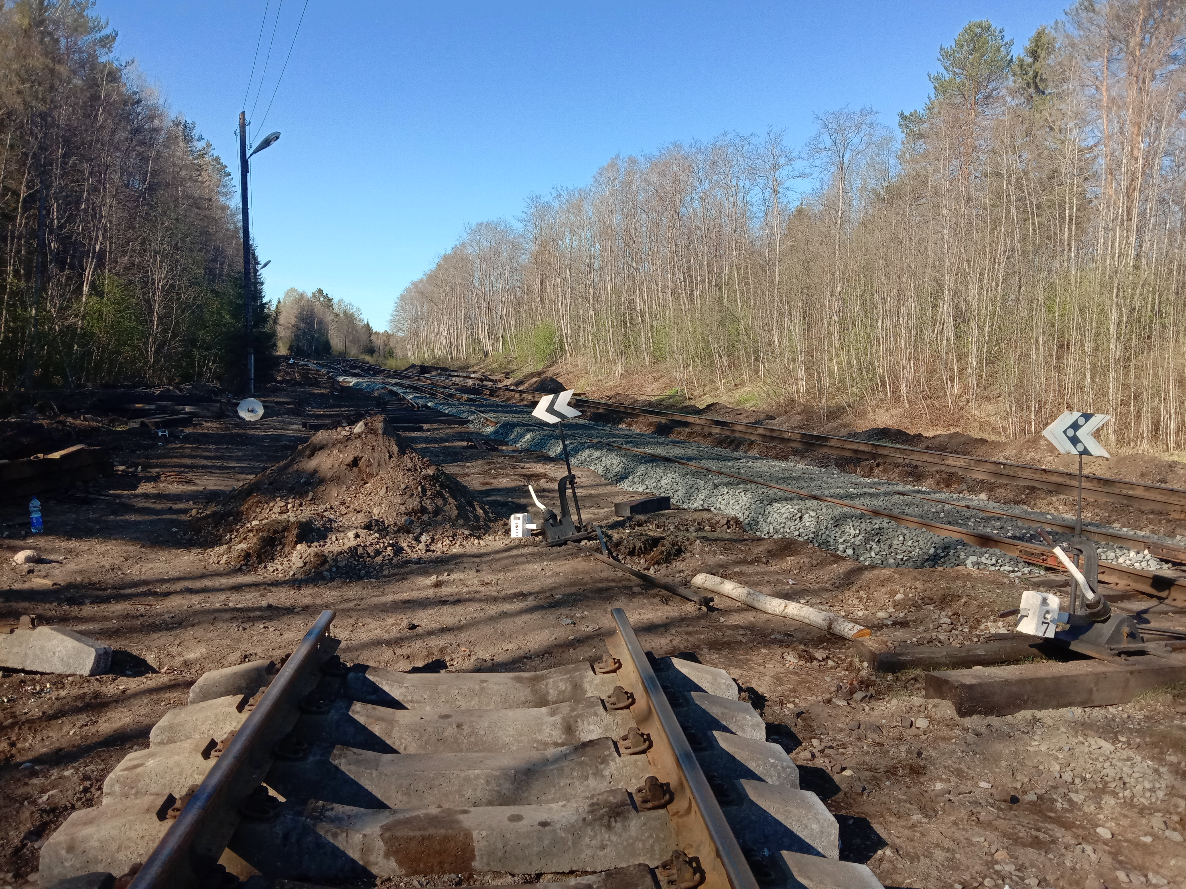 Маткаселькя